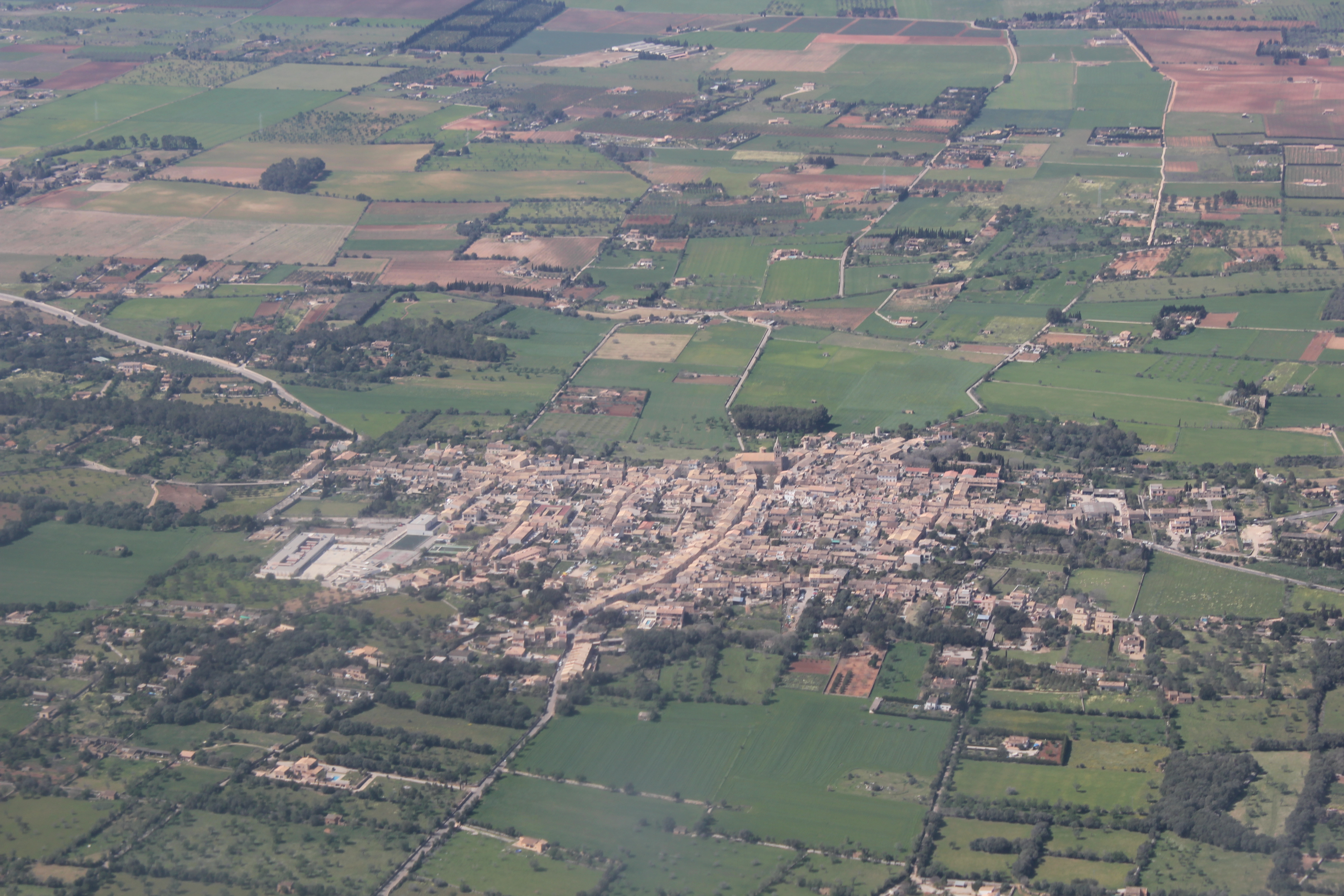 Vista aèria de Sencelles